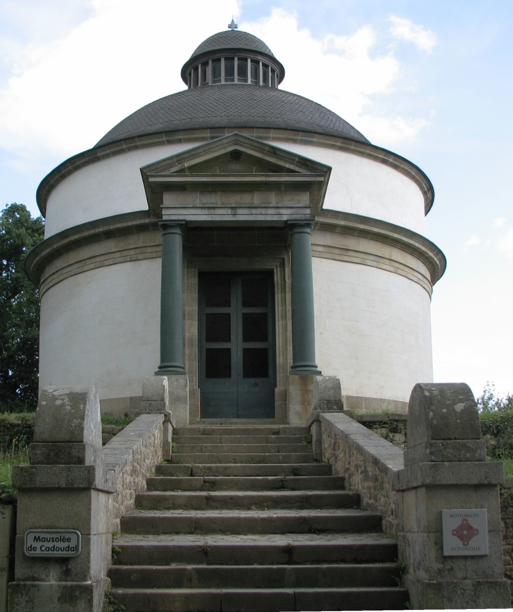 Mausolé de Georges Cadoudal. Village de Kerléano, Auray (Morbihan, France).